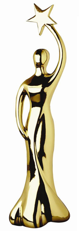 Estatuilla otorgada a los ganadores de una de las categorías.